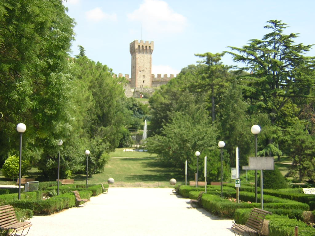 Castello di Este (PD) Foto personale concessa in licenza con licenza di pubblico dominio da Inviaggio